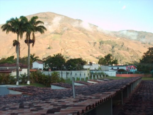 Afueras de la ciudad de Bocono